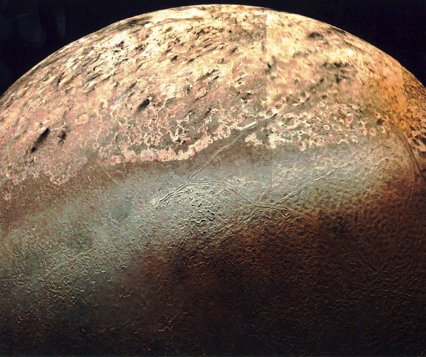 Photo de Triton prise par Voyager 2 lors de son passage le 25 août 1989. description originale: PUBLIC INFORMATION OFFICE JET PROPULSION LABORATORY CALIFORNIA INSTITUTE OF TECHNOLOGY NATIONAL AERONAUTICS AND SPACE ADMINISTRATION PASADENA, CALIF. 91109. TELEPHONE (818) 354-5011 PHOTO CAPTION (TOP) August 29, 1989 P-34764C Voyager 2-N77 Voyager 2 obtained this high-resolution color image of Neptune's large satellite Triton during its close flyby on Aug. 25, 1989. Approximately a dozen individual images were combined to produce this comprehensive view of the Neptune-facing hemisphere of Triton. Fine detail is provided by high-resolution, clear-filter images, with color information added from lower-resolution frames. The large south polar cap at the bottom of the image is highly reflective and slightly pink in color; it may consist of a slowly evaporating layer of nitrogen ice deposited during the previous winter. From the ragged edge of the polar cap northward the satellite's face is generally darker and redder in color. This coloring may be produced by the action of ultraviolet light and magnetospheric radiation upon methane in the atmosphere and surface. Running across this darker region, approximately parallel to the edge of the polar cap, is a band of brighter white material that is almost bluish in color. The underlying topography in this bright band is similar, however, to that in the darker, redder regions surrounding it. The Voyager Mission is conducted by JPL for NASA's Office of Space Science and Applications.